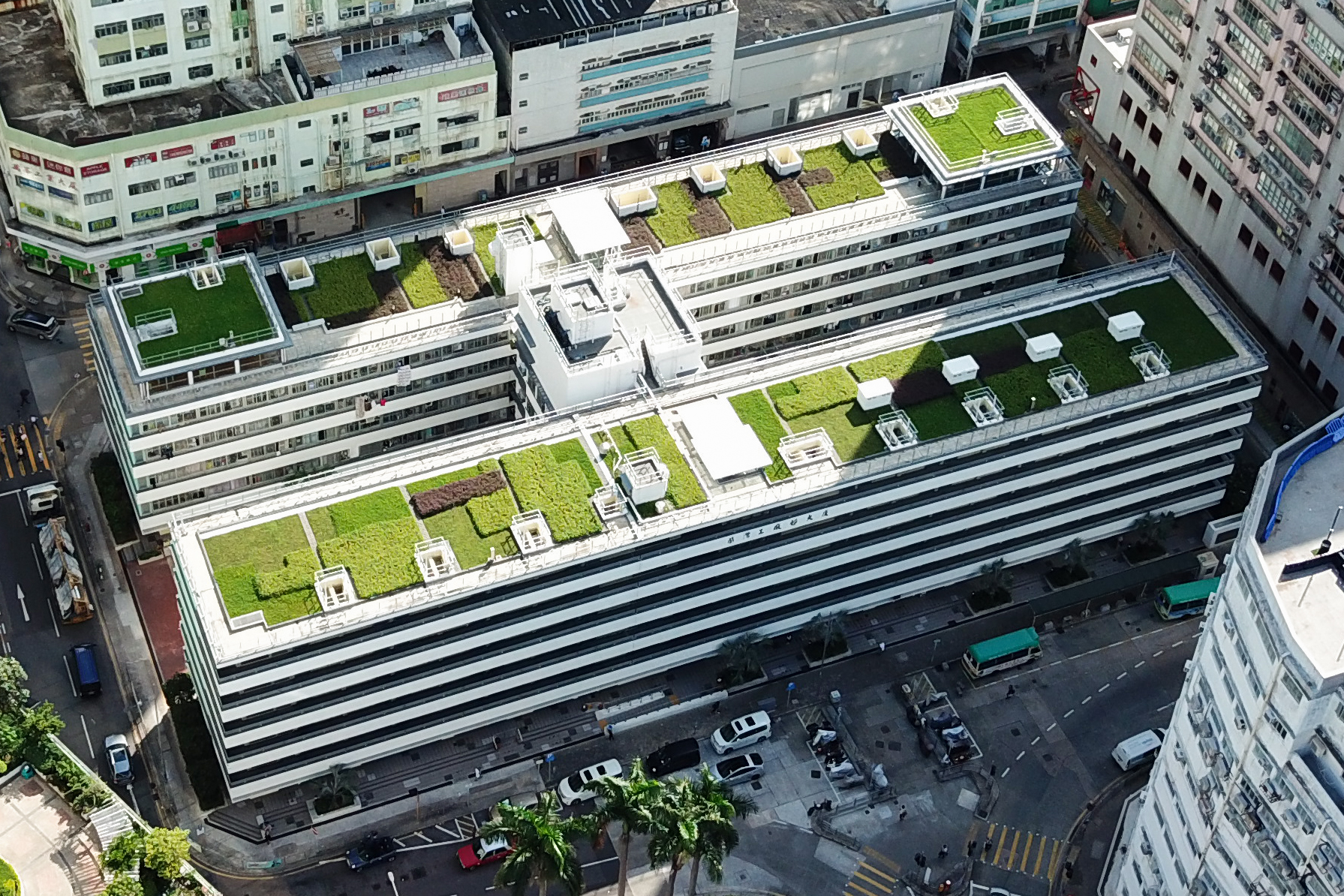 Wah Ha Estate Roof view